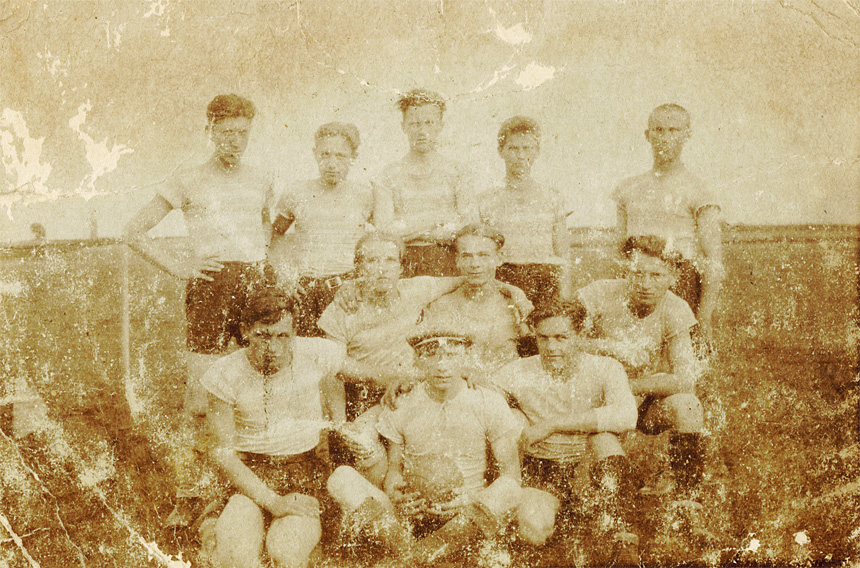 Drużyna TG Sokół Sokołów (1923)